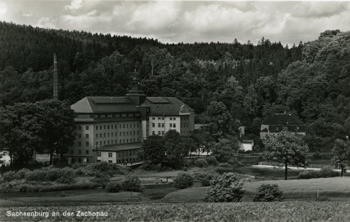 Sachsenburg; Blick auf Sachsenburg This postcard is from publisher Brück & Sohn in Meißen ( postcard has a unique number 26175 and is available in a higher resolution at the publisher. This images was uploaded in a cooperation project between Wikipedians and the publisher.